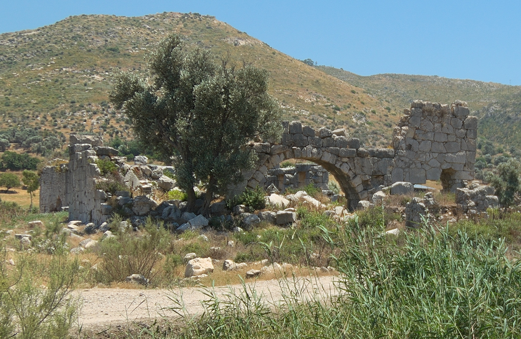 Патара. Центральные бани